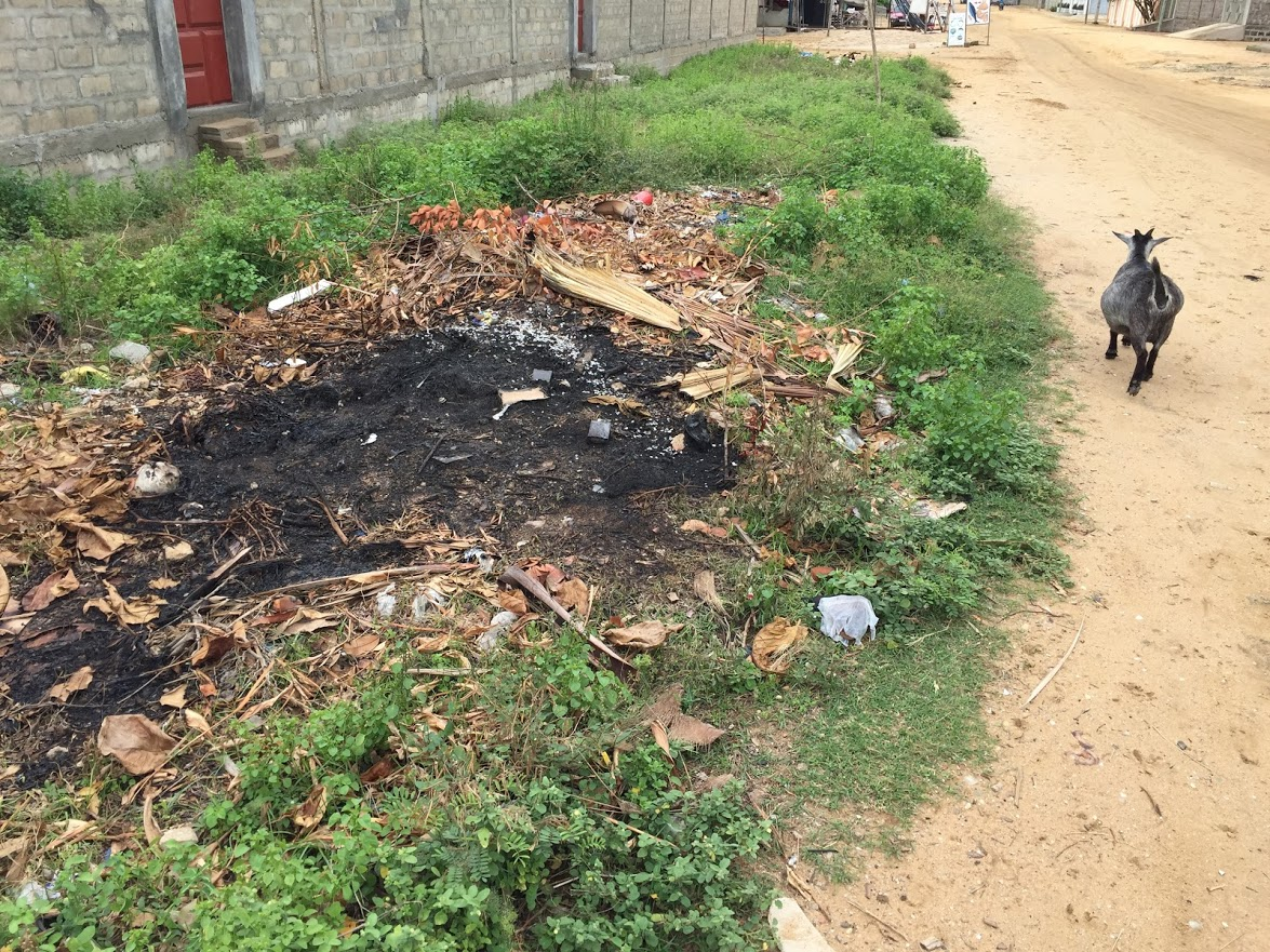 L'absence de gestion des déchets au Bénin oblige la population à entasser ses ordures au bord des routes avant d'y mettre le feu lorsque le tas devient conséquent. Ces pratiques sont la source d'inévitables maladies liées à ce type de pollution.